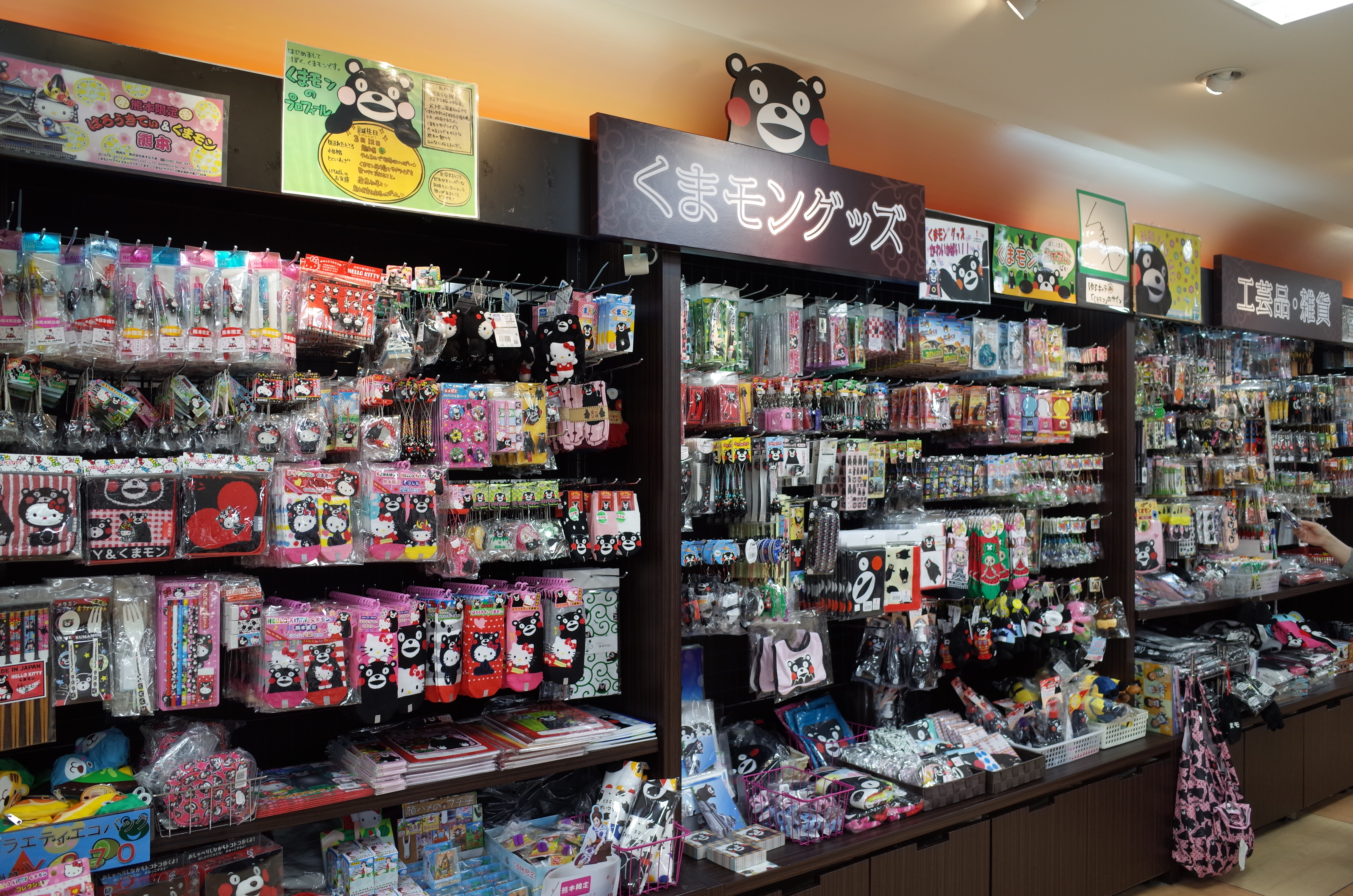 熊本空港